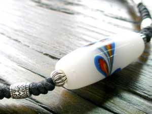 孔雀之珠